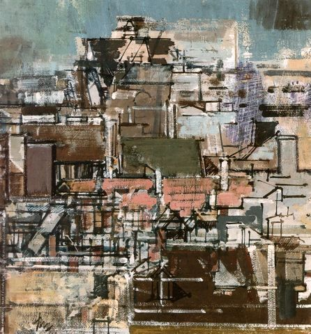 Photographie de la peinture Saint-Eustache acrylique 53x50 1986 de l'artiste peintre français Alain Mongrenier.